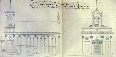 Беларуская (тарашкевіца): Вялейка (Vialejka), вуліца Нароцкая (vulica Narockaja). Касьцёл, нерэалізаваны праект